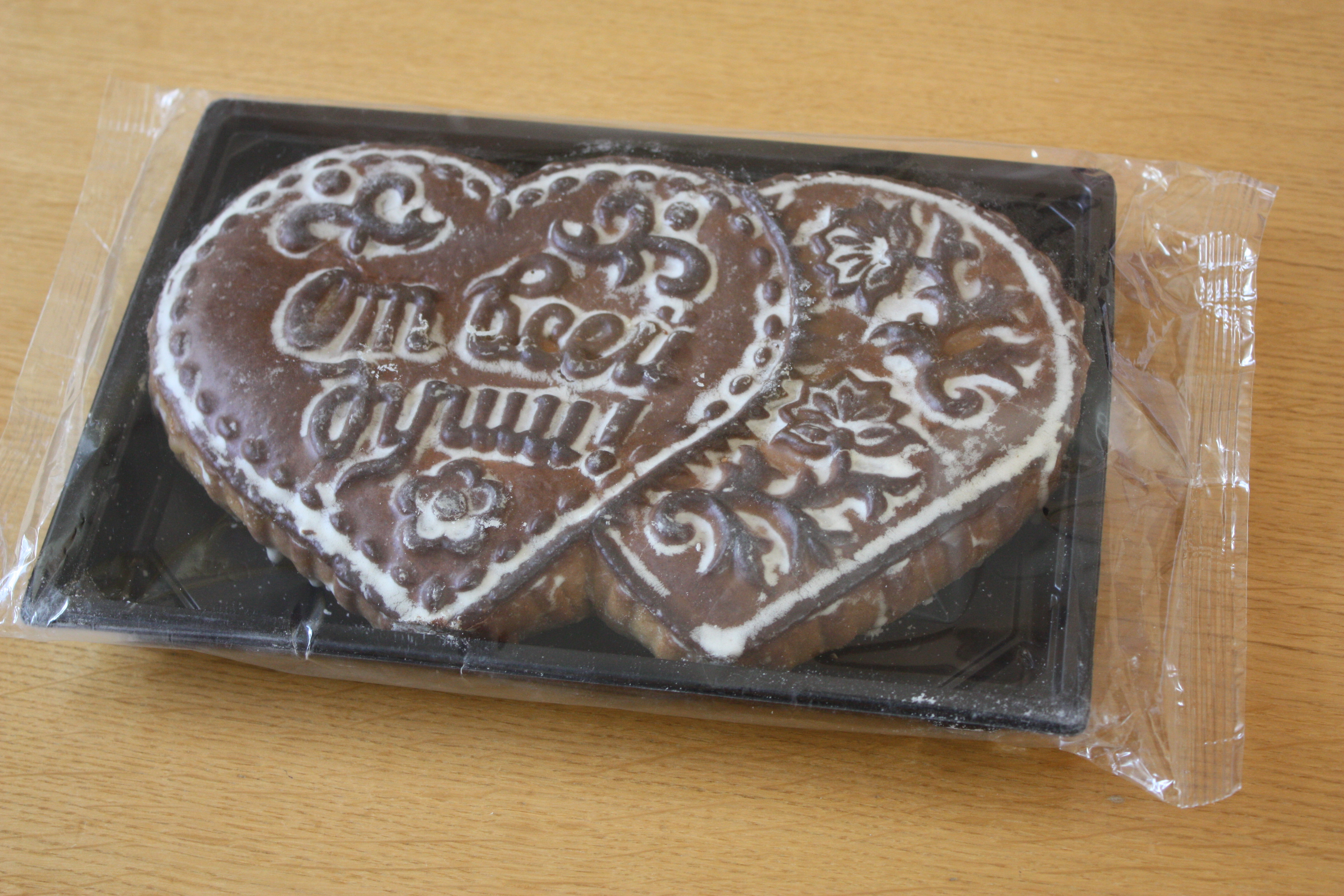 traditioneller russischer Pfefferkuchen aus Tula